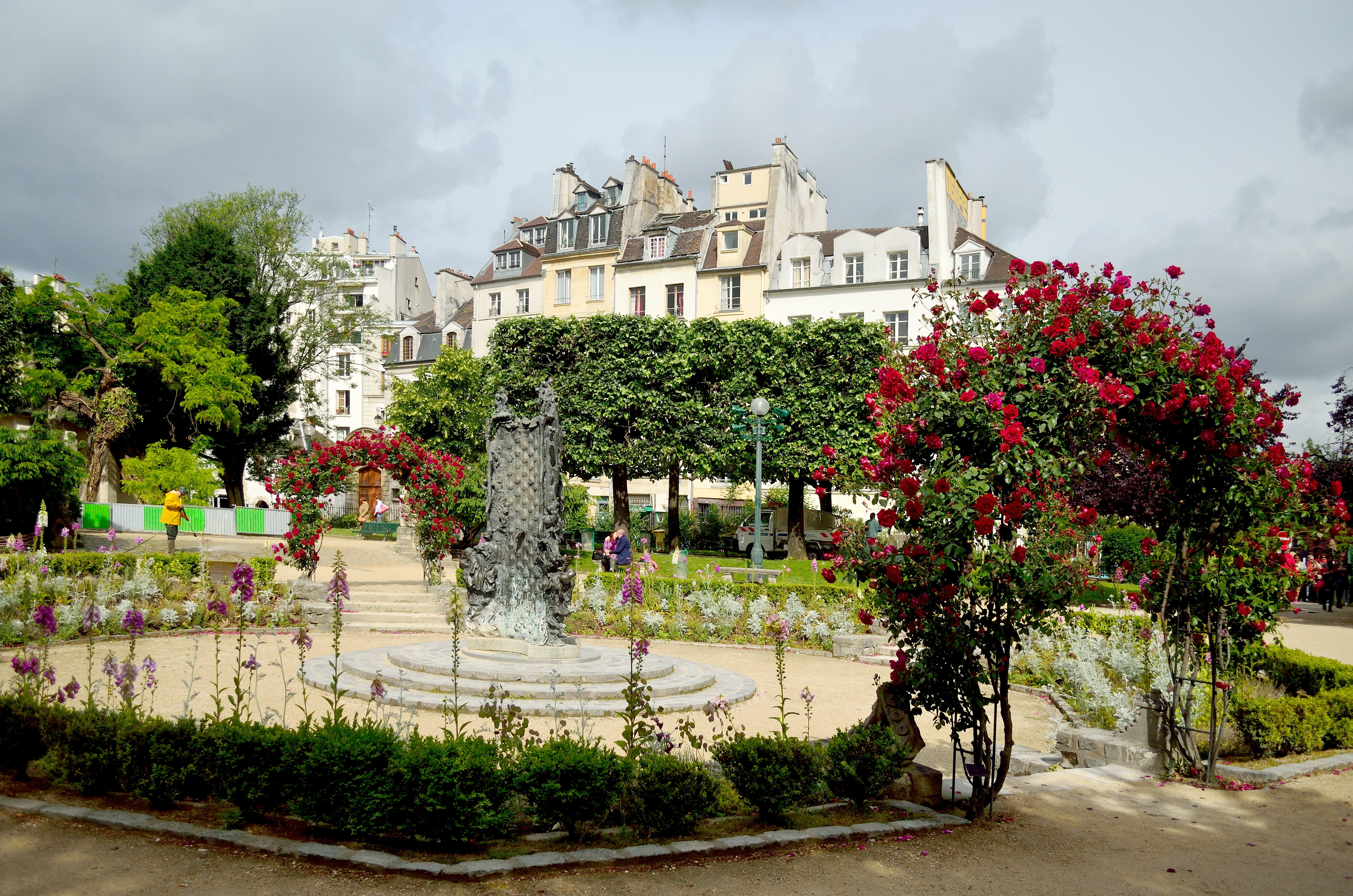 Square Rene Viviani, Paris.